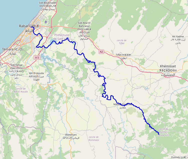 carte réalisée sur umap This map may be incomplete, and may contain errors. Don't rely solely on it for navigation.